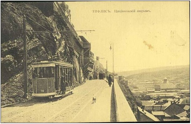 Tbilisi